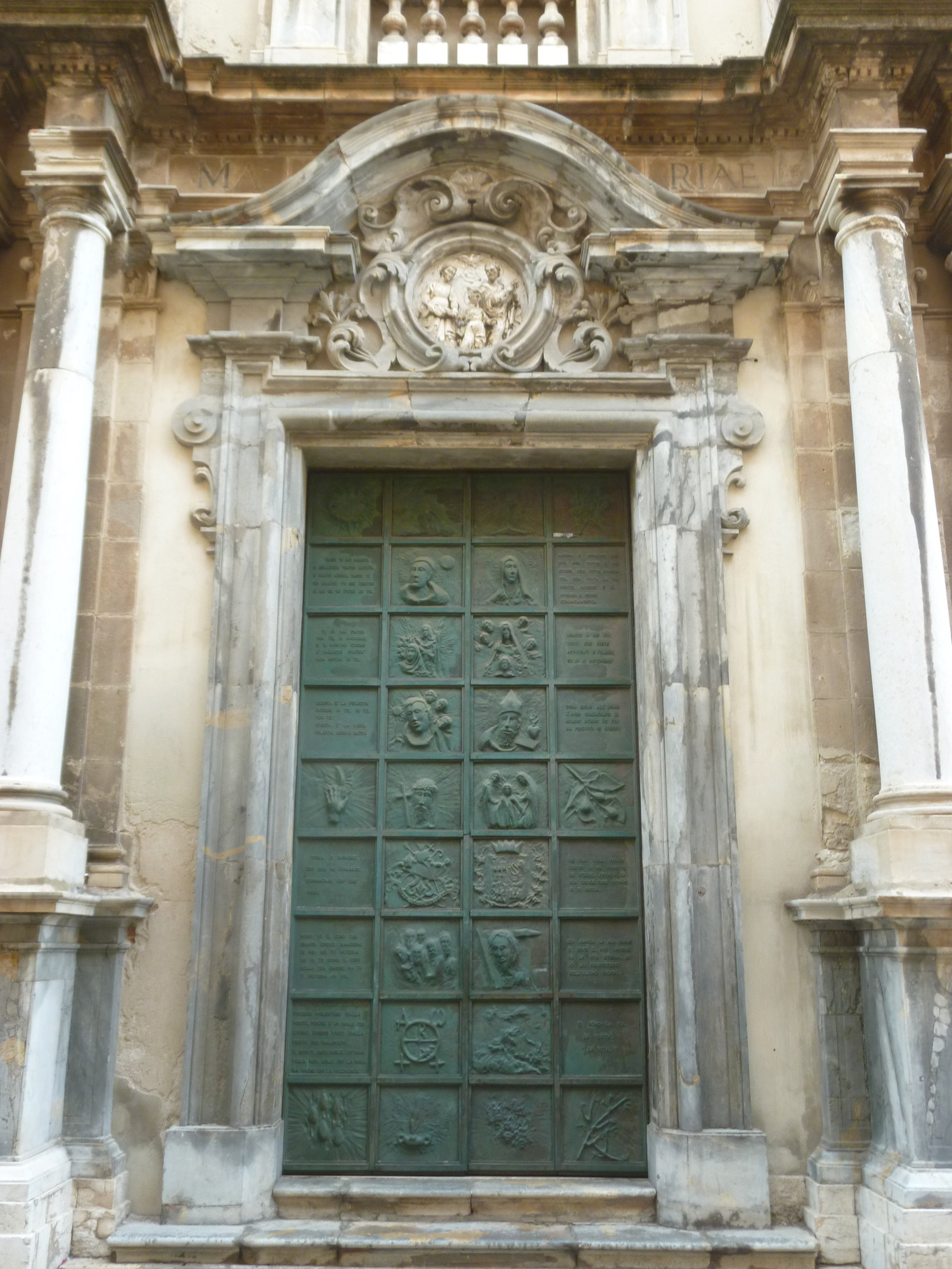 Portone Chiesa S. Rita, Trapani